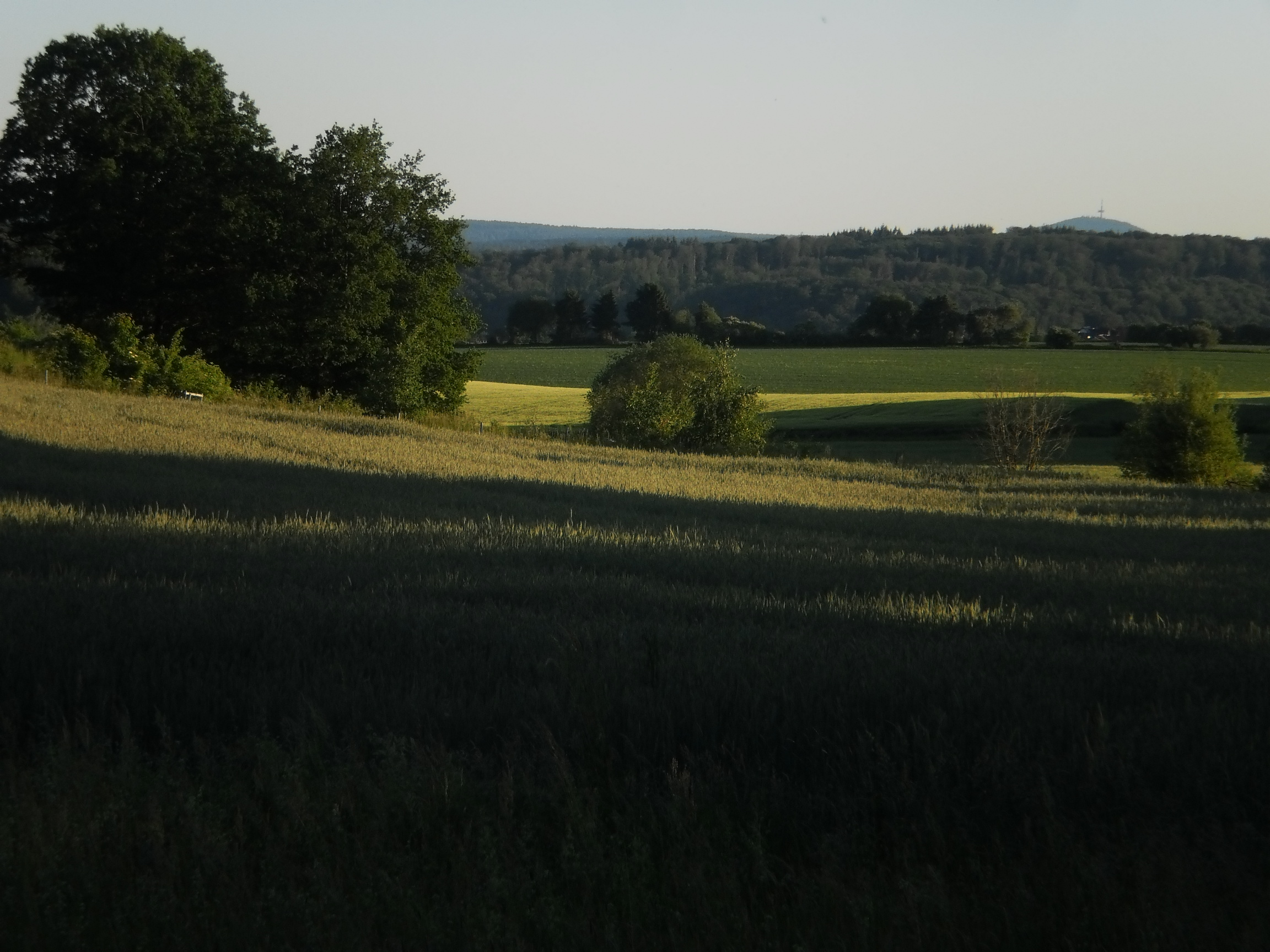 Quellgebiet des Cyriaxweimarer Bachs mit landwirtschaftlichen Flächen unterhalb des Hasenkopf-Hangs nahe Marburg-Neuhöfe. Am Horizont in der Ferne ist der Dünsberg als Kuppe über dem Waldgebiet im Südwesten erkennbar, 2019-06-02.